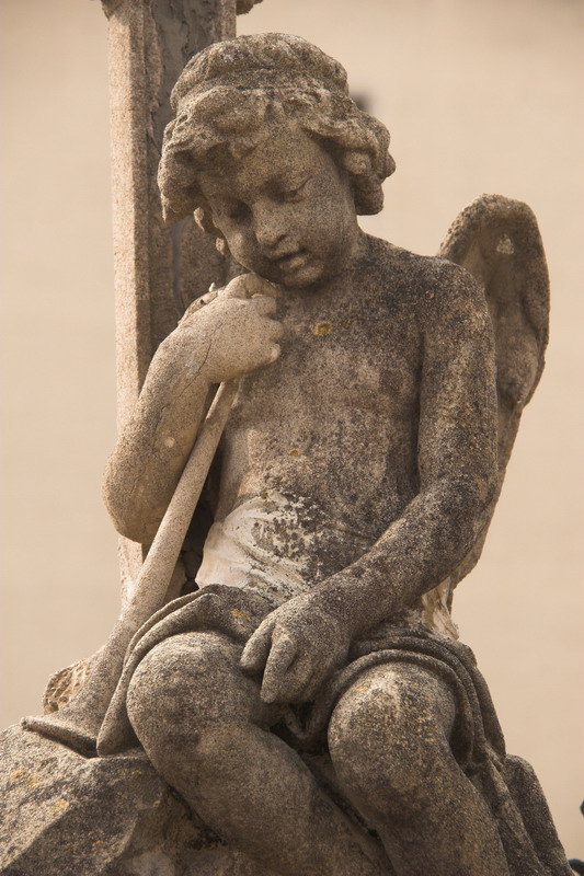 Àngel sobre una tomba (Lloret de Mar-La Selva-Catalunya), dins del cementiri modernista de Lloret de Mar (1901).